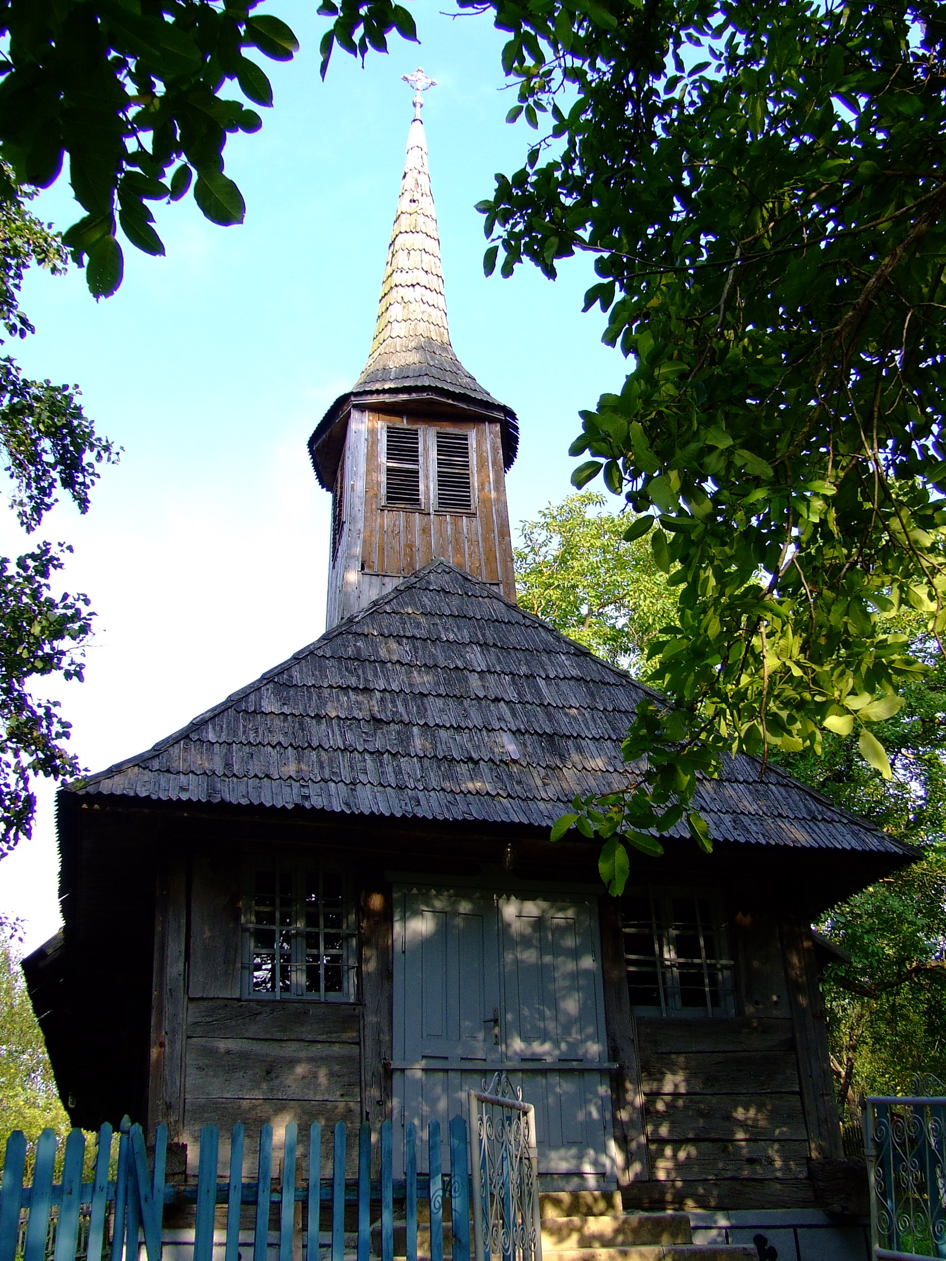 Magyarbaksa Szent Mihály és Gábriel arkangyalok görögkatolikus fatemplomaRomână: Biserica de lemn din Bocşiţa